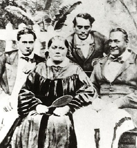 La famille royale au début des années 60. Peu à peu le statut d’une administration tahitienne côtoyant l’administration coloniale se réduisit à la subordination de la première à la seconde. Cependant, bien qu’elle eût très peu de pouvoir effectif, la reine conserva un prestige considérable.